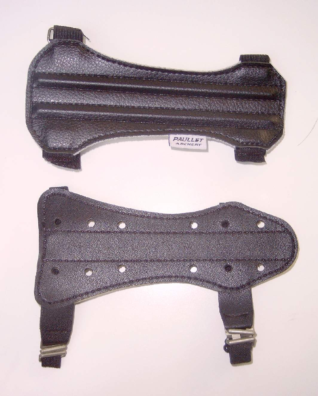 Armschutz fürs Bogenschießen